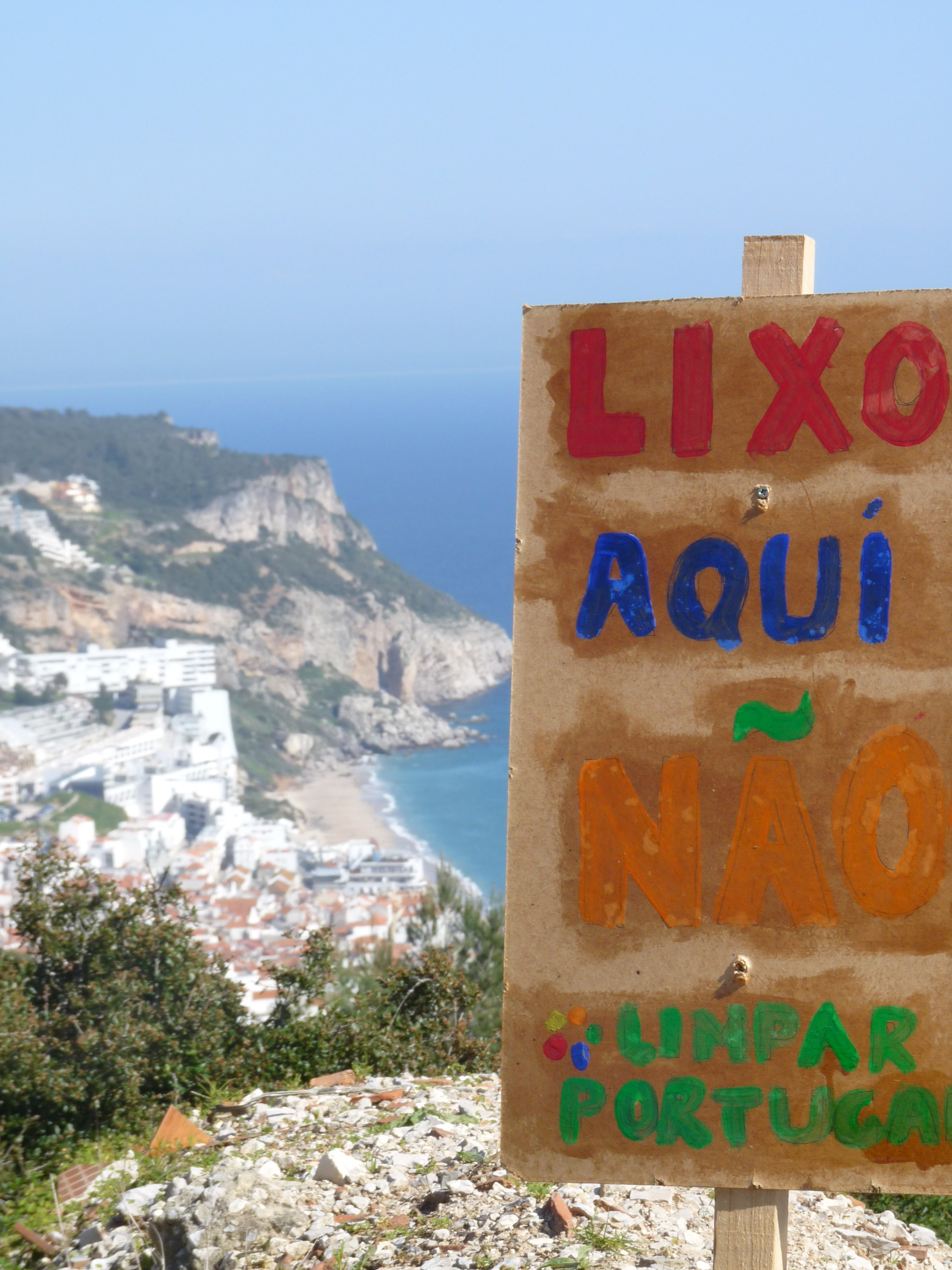 Mantenha Sesimbra Limpa